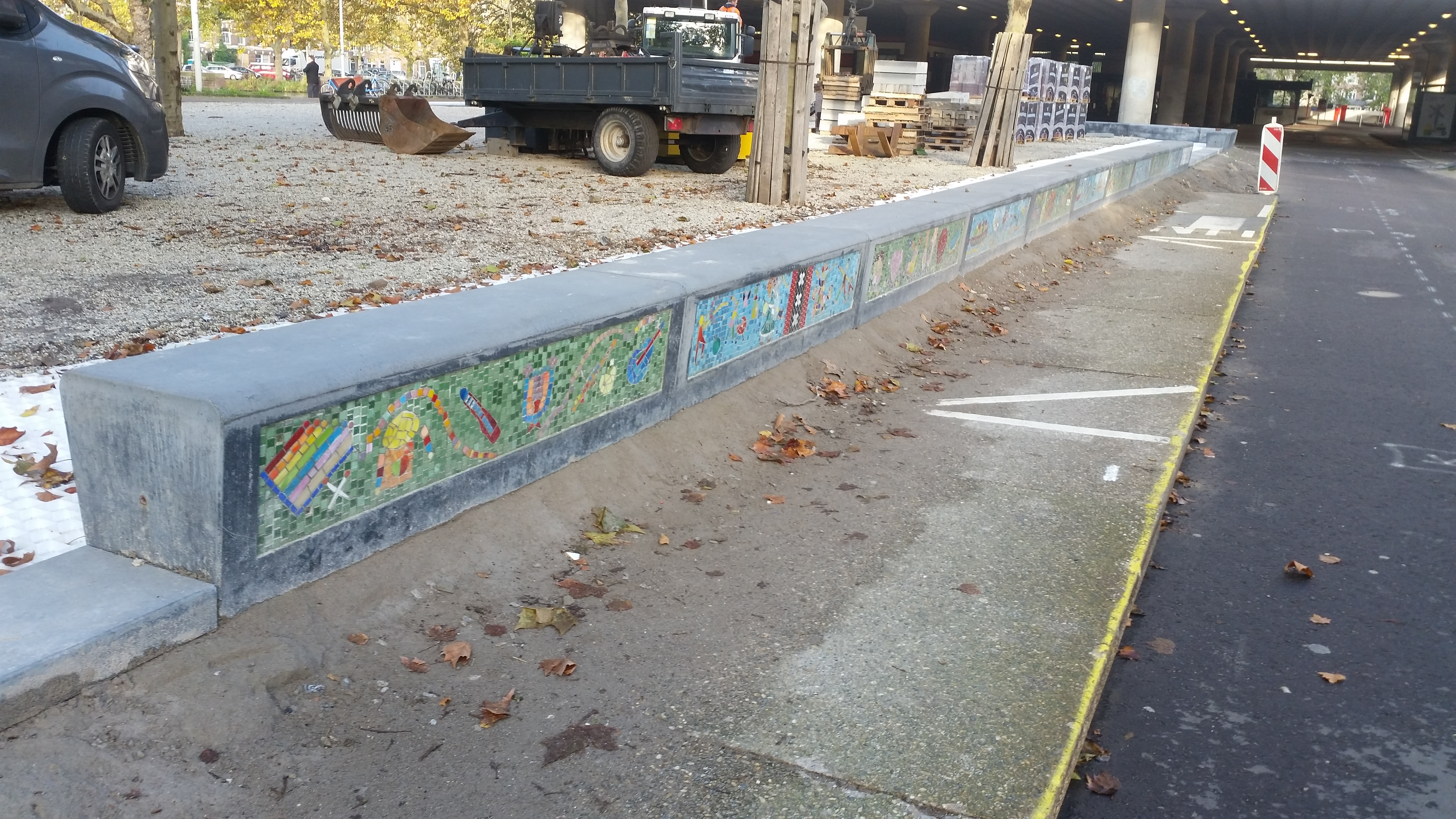 Overzicht van Mozaiekbank Busstation Elandsgracht